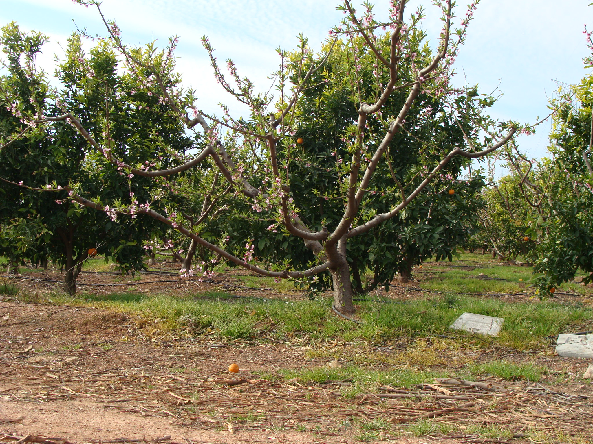 Coexistencia de dos cultivos en una sola parcela en el término municipal de Catadau, provincia de Valencia (naranjas y melocotones). Ello se hace para evitar el monocultivo y programar tareas distintas en diferentes épocas del año